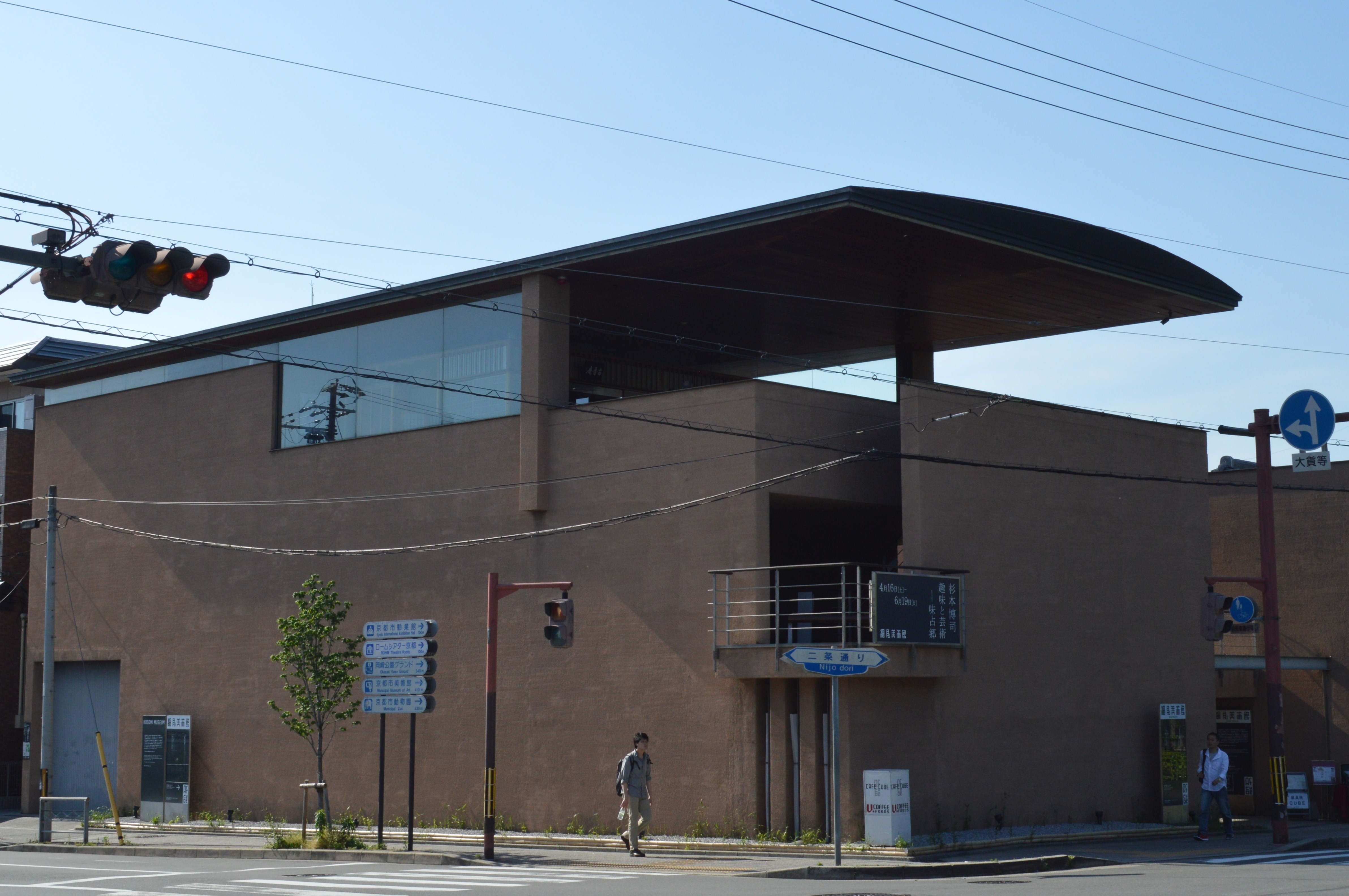 京都市左京区 細見美術館